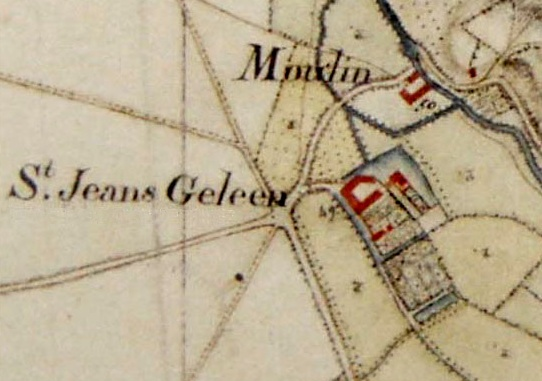 Tranchotkaart van Sint Jans Geleen